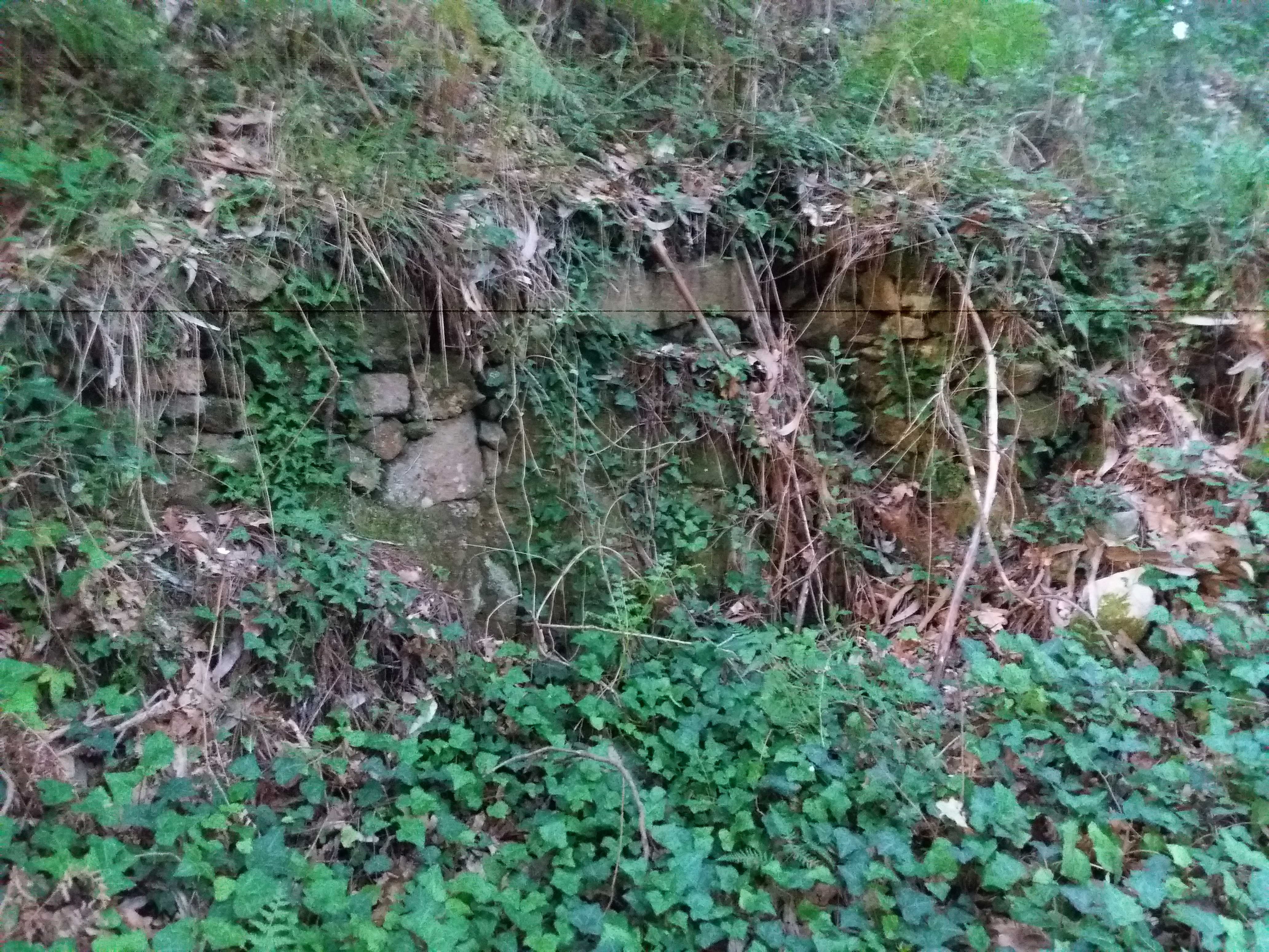 O que foron terras de viñas e cultivos hoxe está a cuberto pola vexetación . Inda é posible observar postes das antigas viñas.